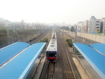 1호선 철로. 도원교 위에서 서북 방향으로 촬영.